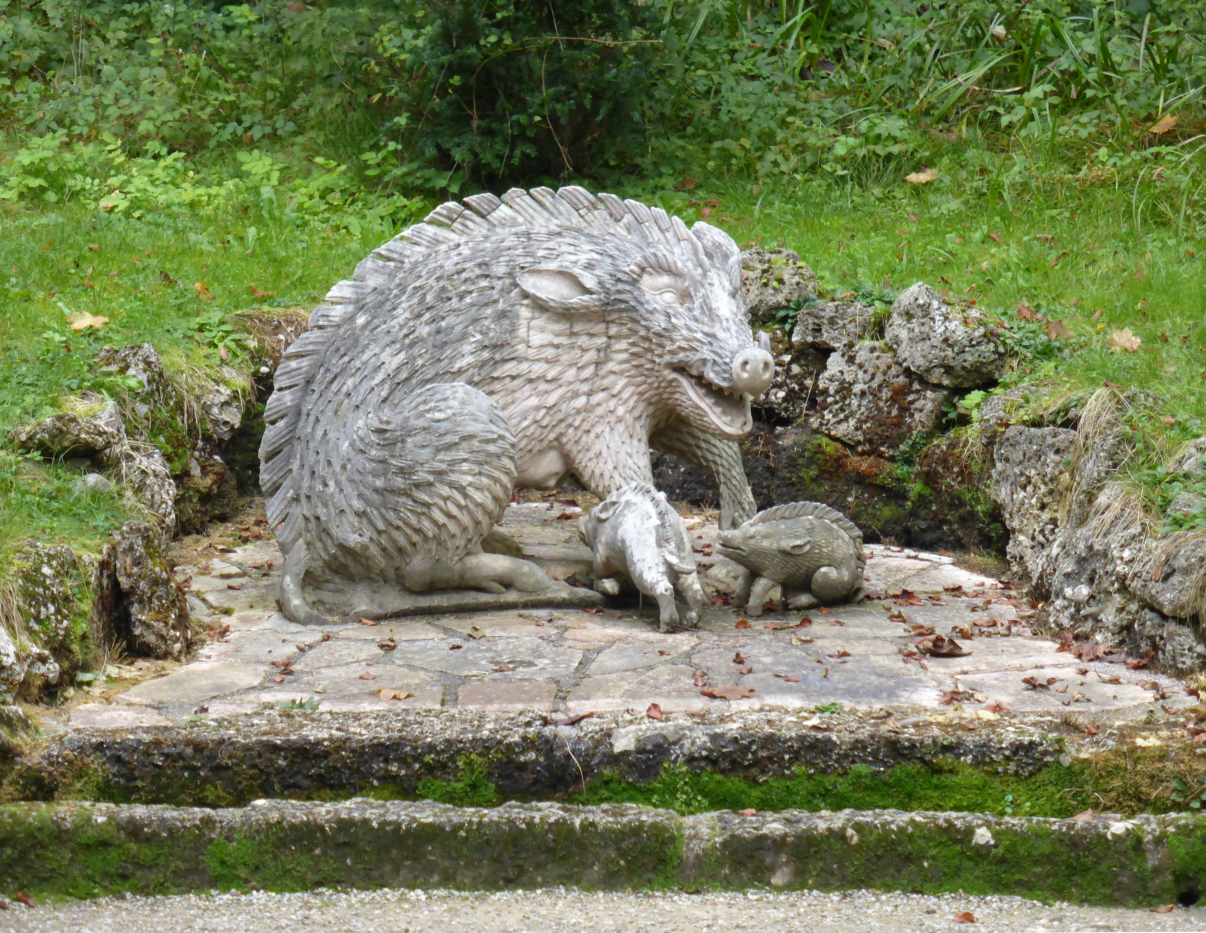 Wasserspiele Schloss Hellbrunn (Wildschweinnische), Salzburg.